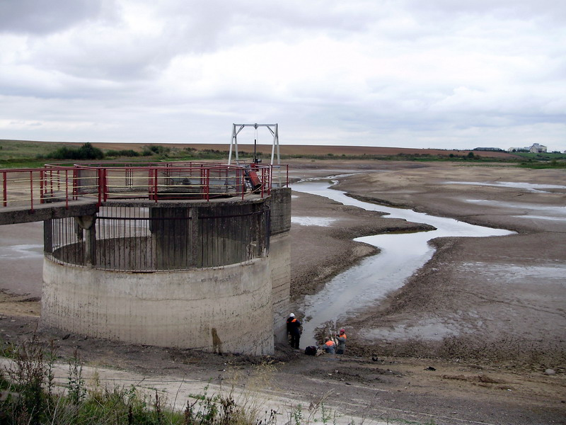 Janušonių tvenkinys, Kauno rajonas, Lietuva. Iš tvenkinio išleistas vanduo, nes statoma hidroelektrinė.